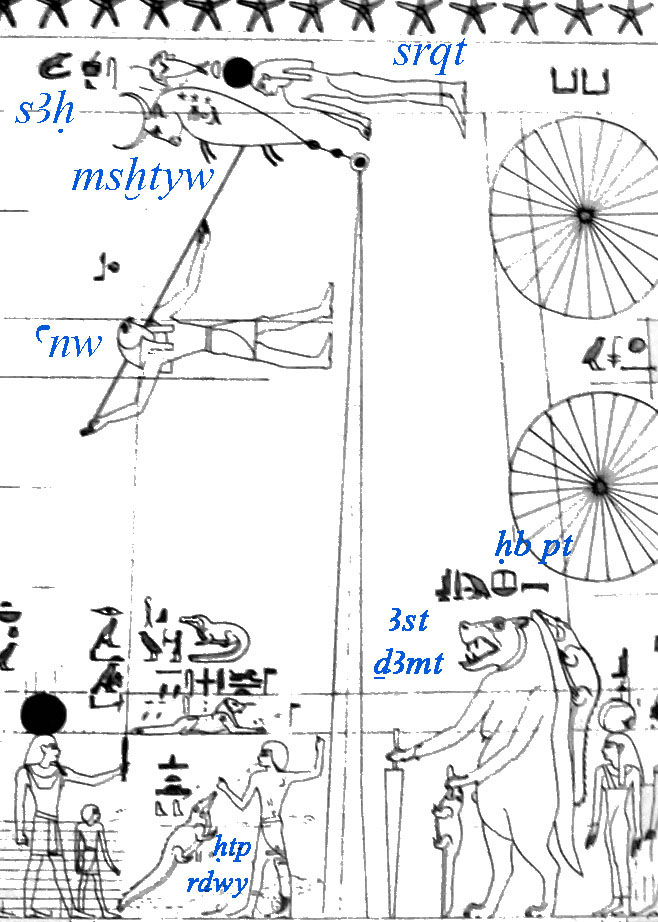 Constellations représentées sur les murs de la tombe de Sénenmout